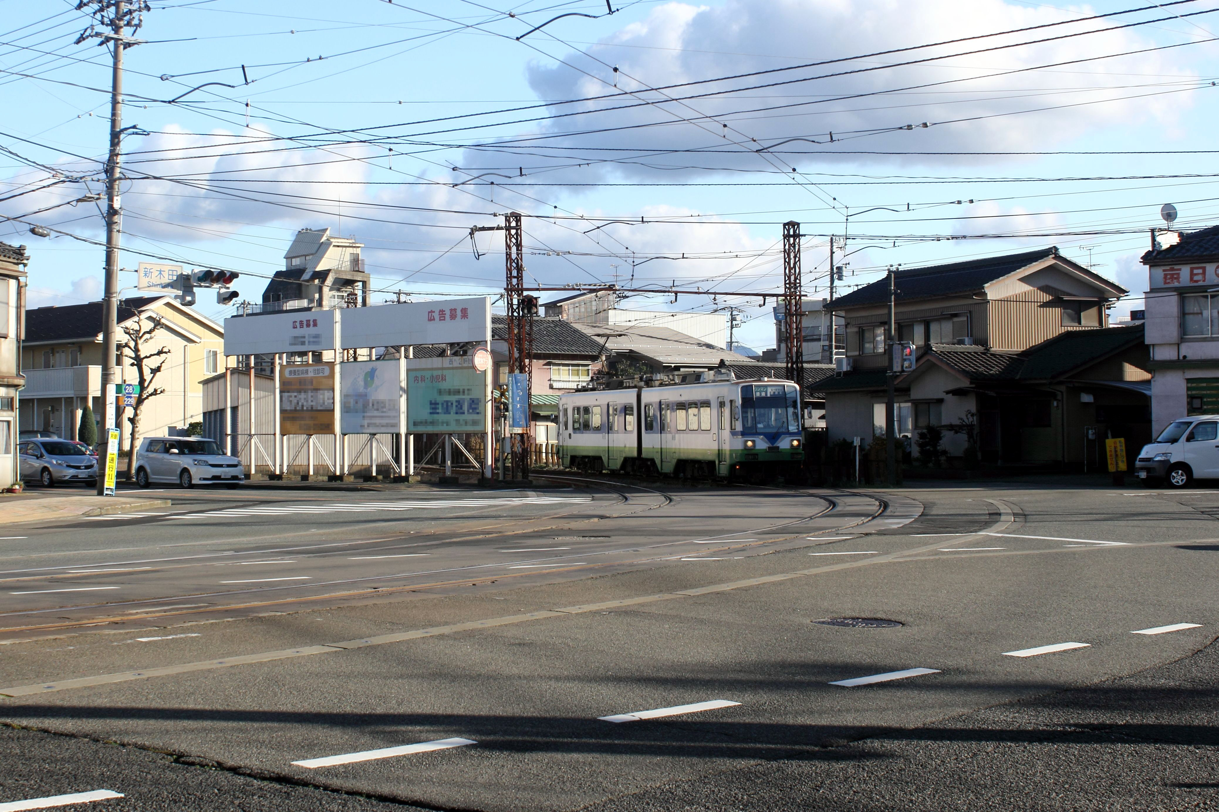 福井鉄道福武線 鉄道から軌道に変わる新木田交差点